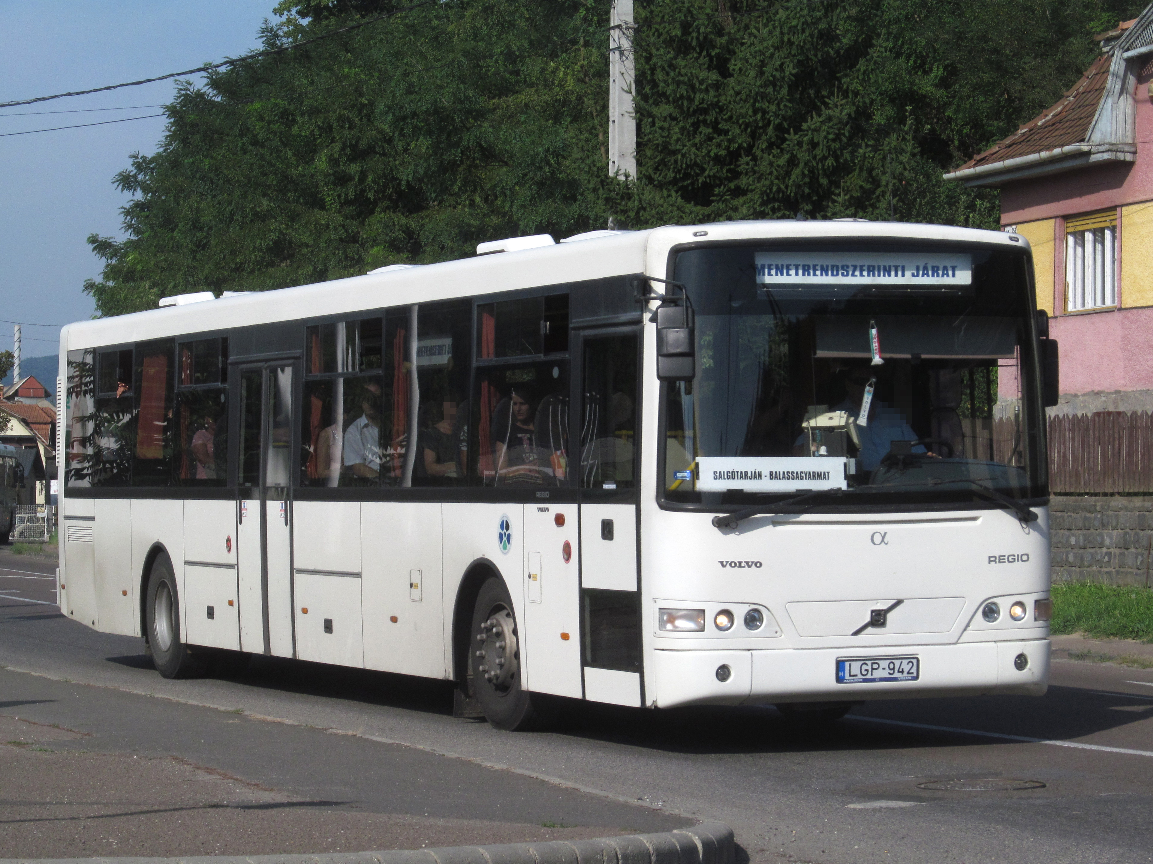 LGP-942 Volvo-Alfa Regio (Salgótarján)